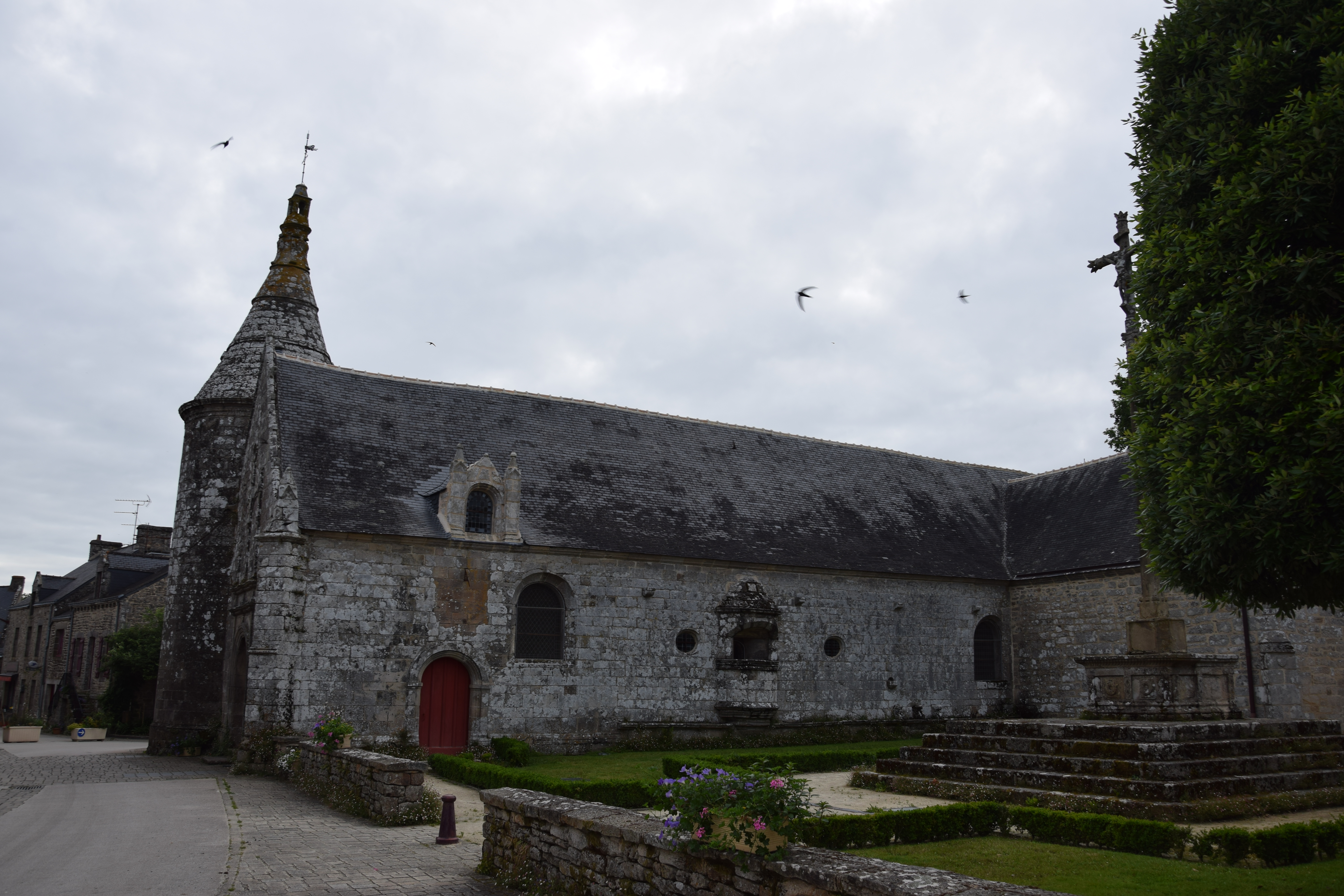 Église Sainte-Anne du Guerno exterieur